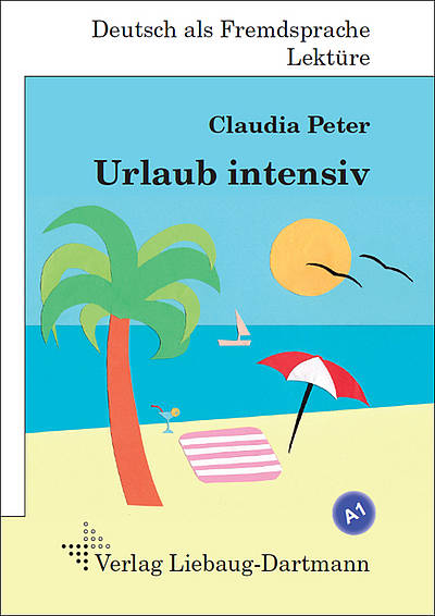 Buchcover des Buches Urlaub intensiv von Claudia Peter, das 2013 im Verlag Liebaug-Dartmann, Meckenheim, erschienen ist.